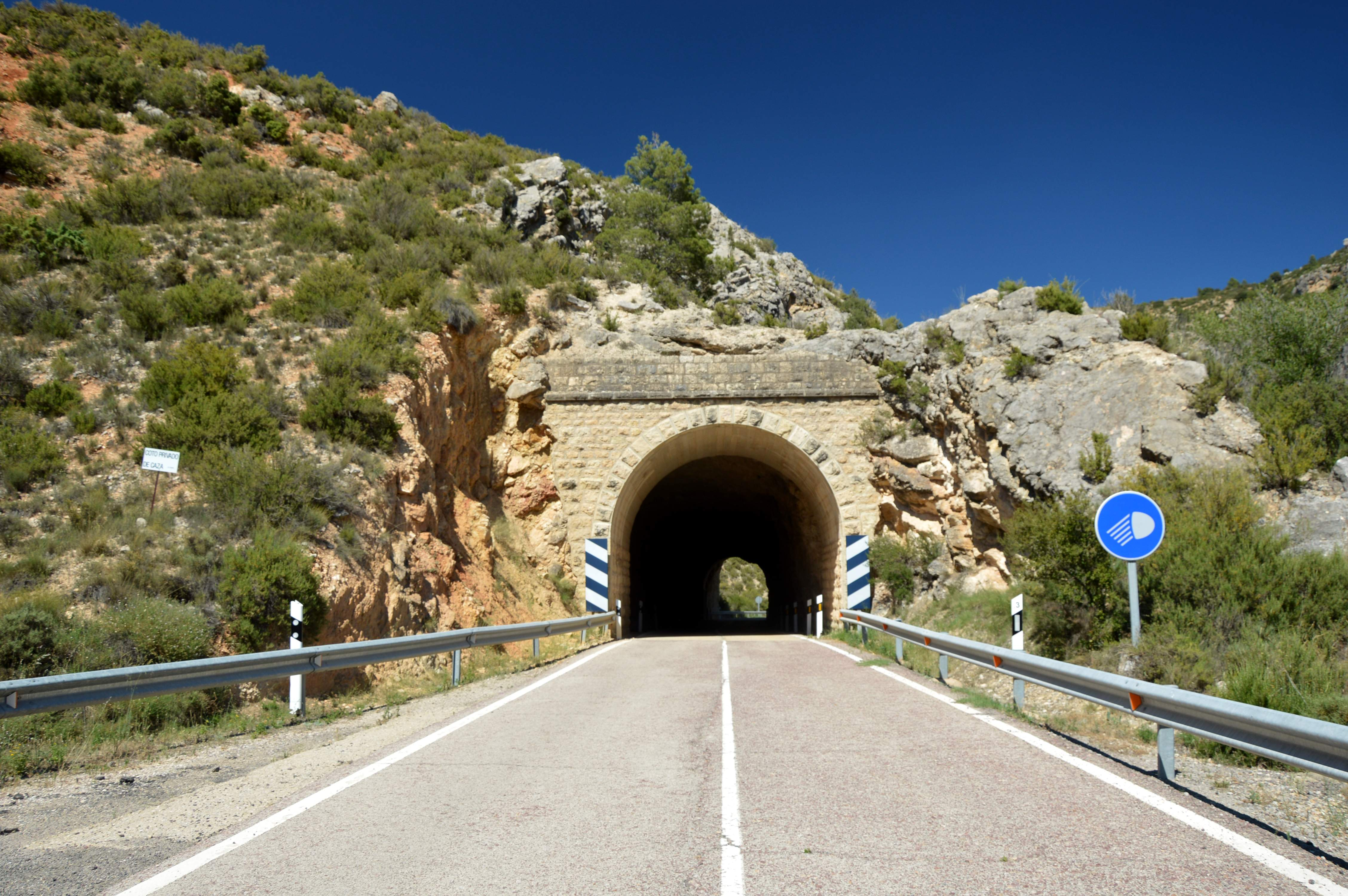 Entrada al Rincón de Ademuz por el túnel de Abajo (túnel 2) de Casasbajas (Valencia), en la N-330a (2018).